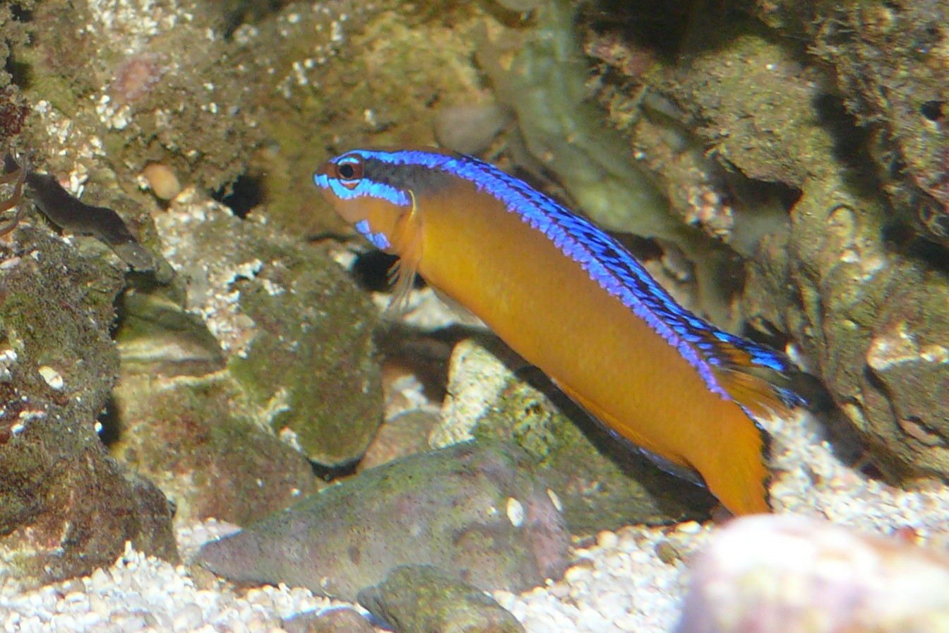 Pseudochromis aldabraensis - Aldabra Zwergbarsch